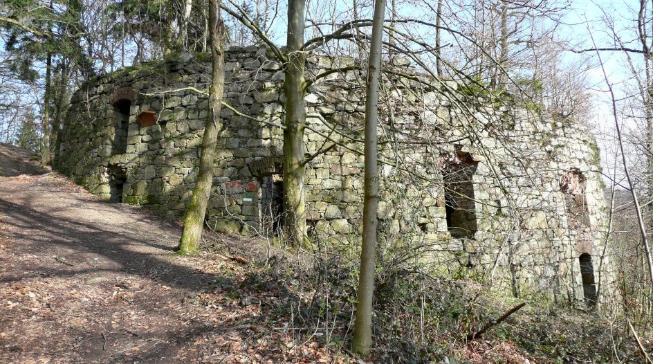 Warte Edelburge der Maximilianischen Turmlinie